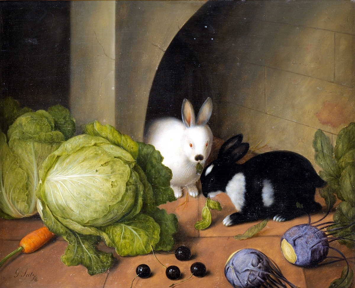 Gemüsestilleben mit Häschen. Signiert. Öl auf Holz, 44 x 54 cm